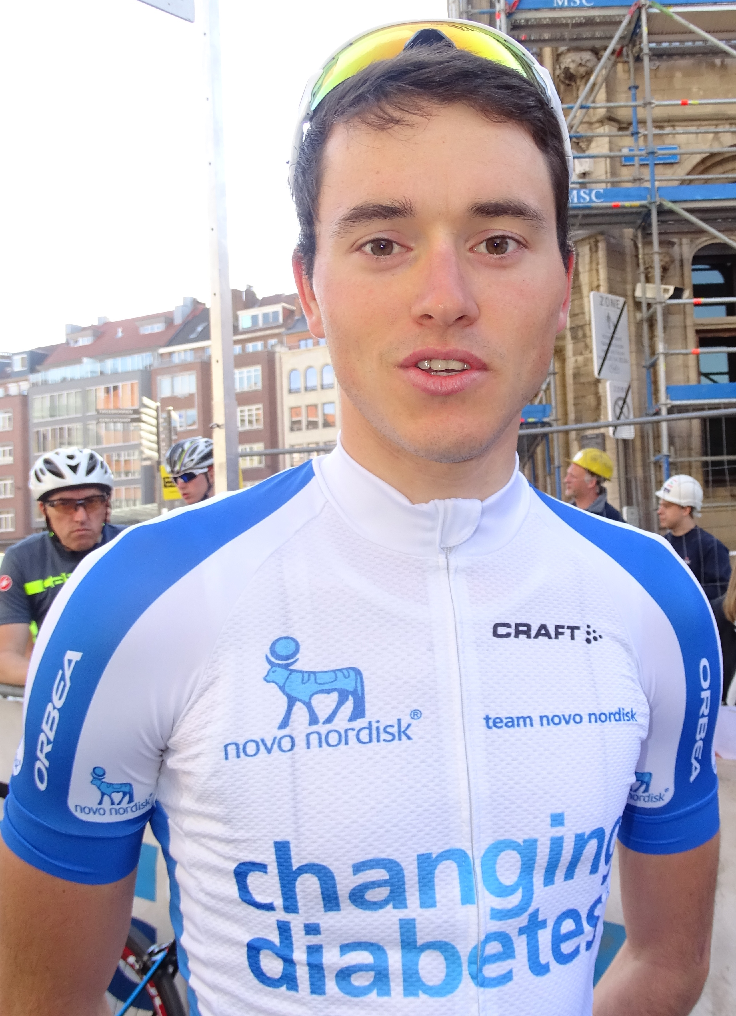 Reportage réalisé le mercredi 15 avril à l'occasion du départ de la Flèche brabançonne 2015 à Louvain, Belgique.